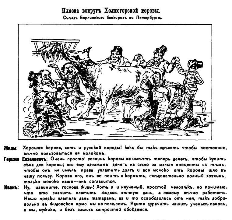 Карикатура "Танці навколо холмогорської корови" з видання "Еврейский вопрос в картинках" 1884 (вип. 1)